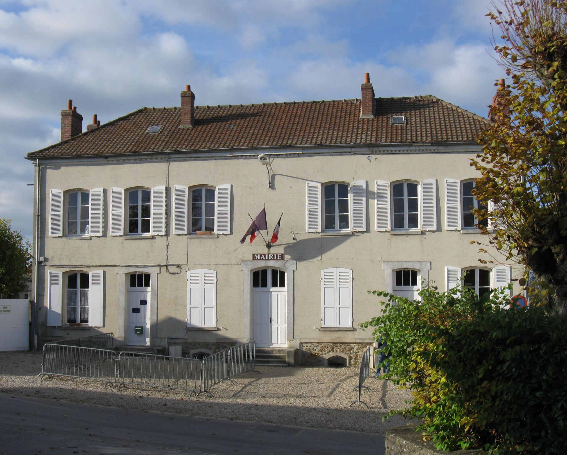 Mairie de Boutigny (Seine-et-Marne, région Île-de-France).